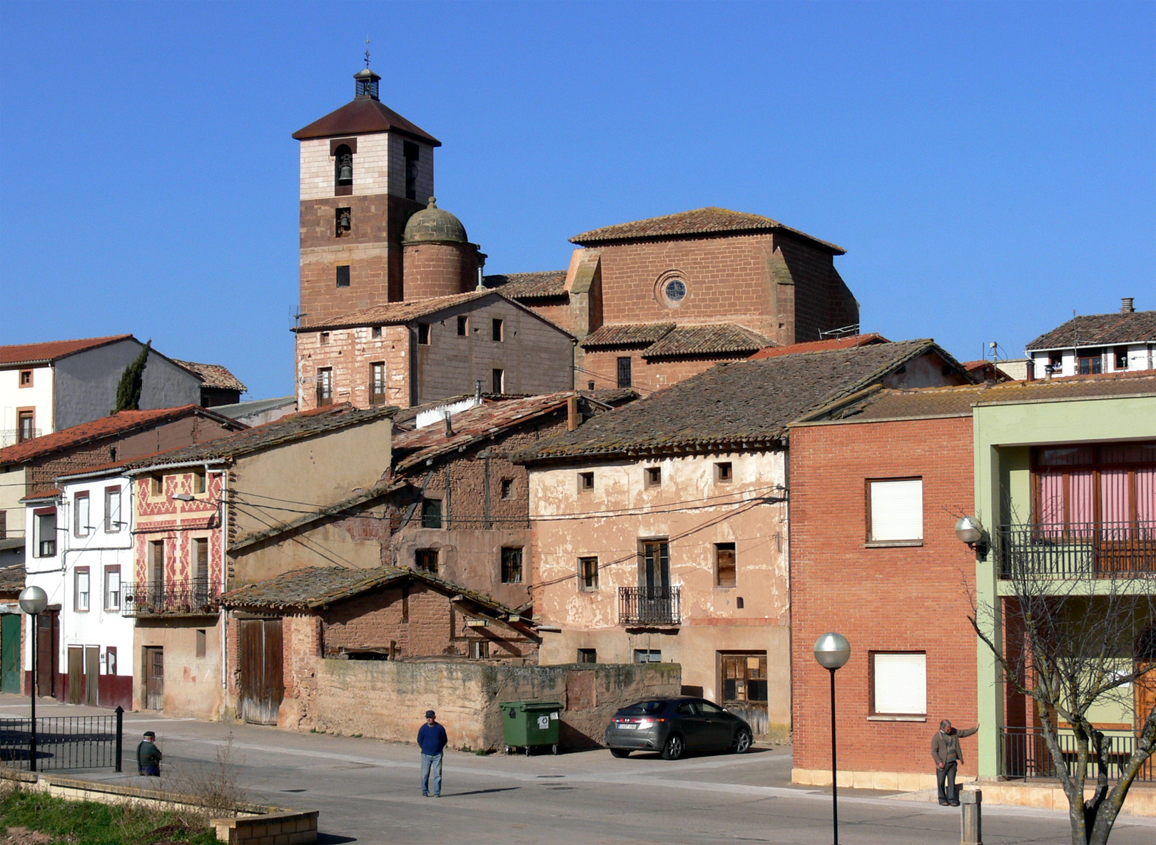 Cañas, La Rioja - España.